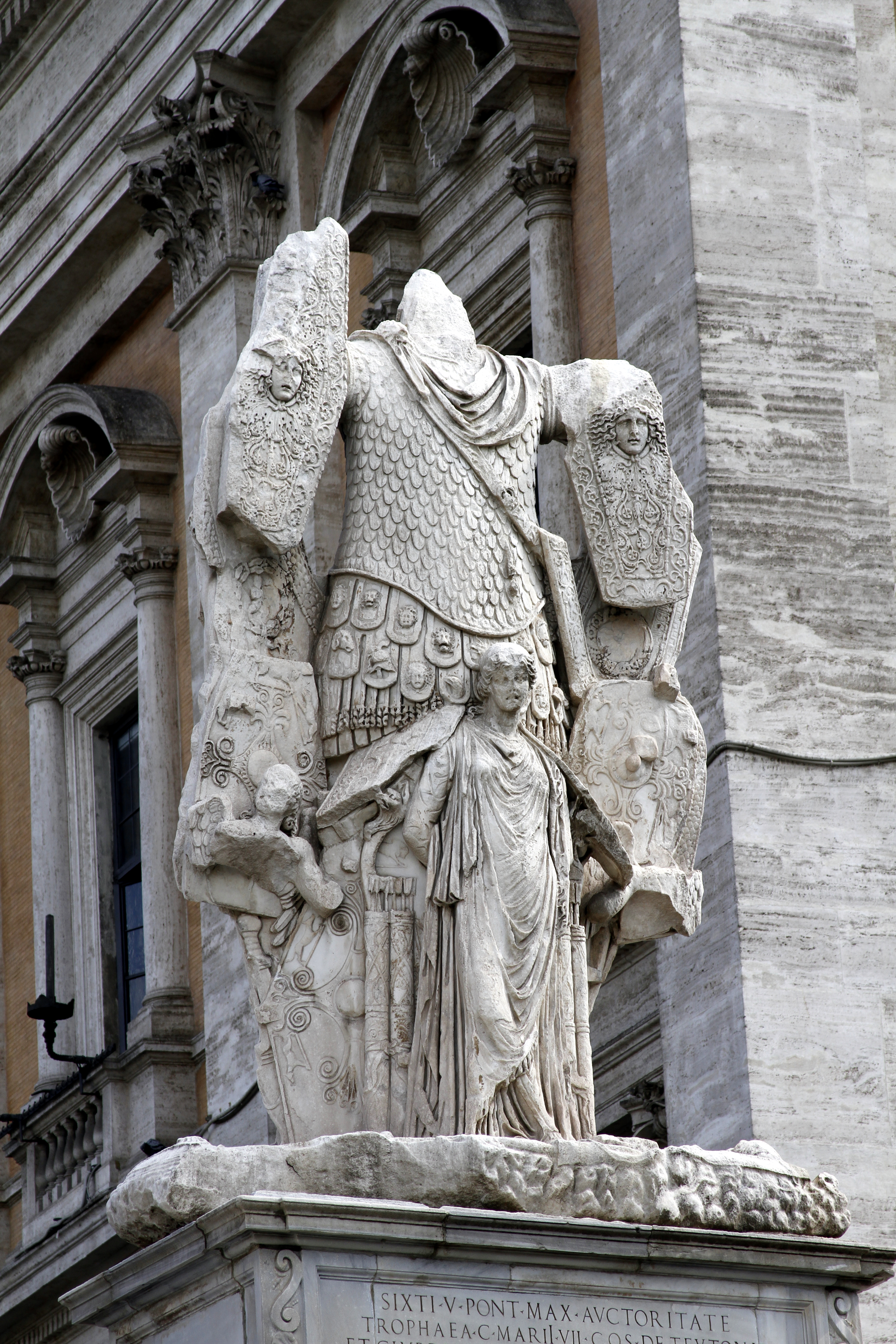 Piazza del Campidoglio - Rome